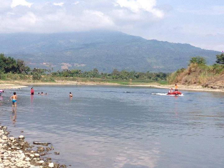 Zapotal